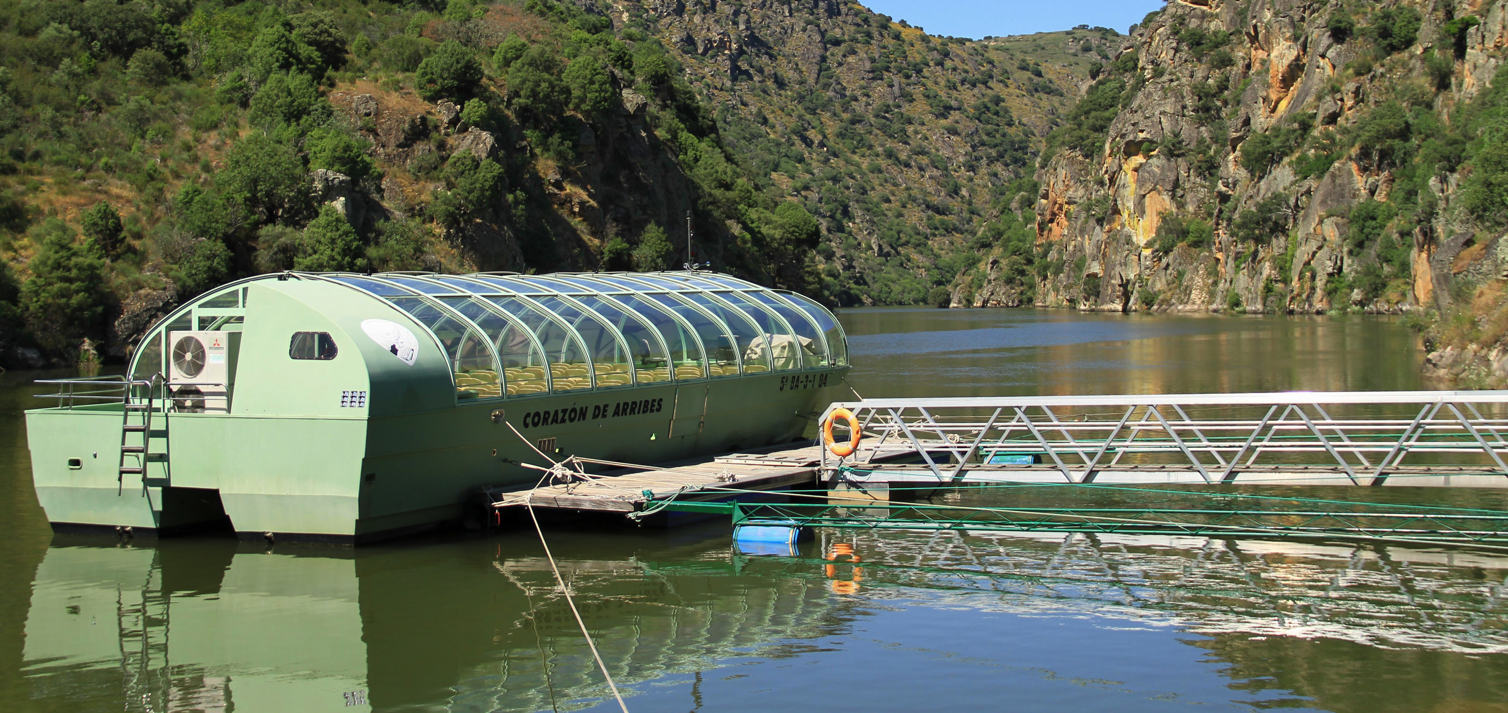 Barco de la playa del Rostro de Corporario, Parque Natural de Arribes del Duero, España.